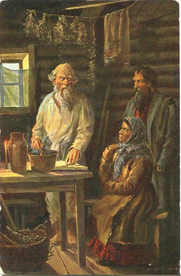 У знахаря. Гадание на воде о пропавшей лошади в Тамб. губ. Художник И.М. Львов. Открытка, изданная в 1912 г. в Москве И.Е. Селиным.